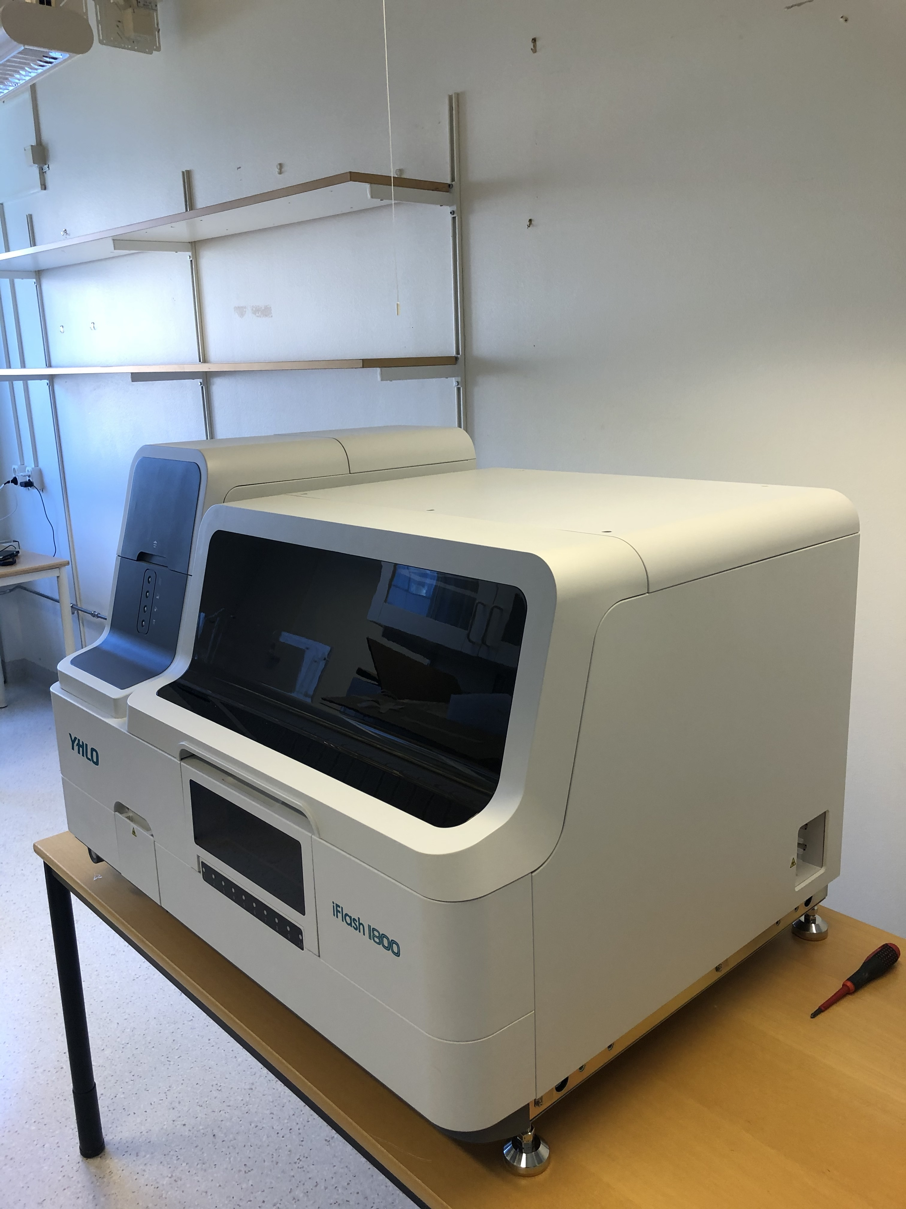 Ett instrument som analyserar prover för att hitta antikroppar, bland annat för Corona